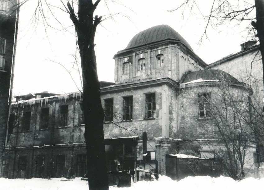 Храм Никиты Новгородского (Тула)